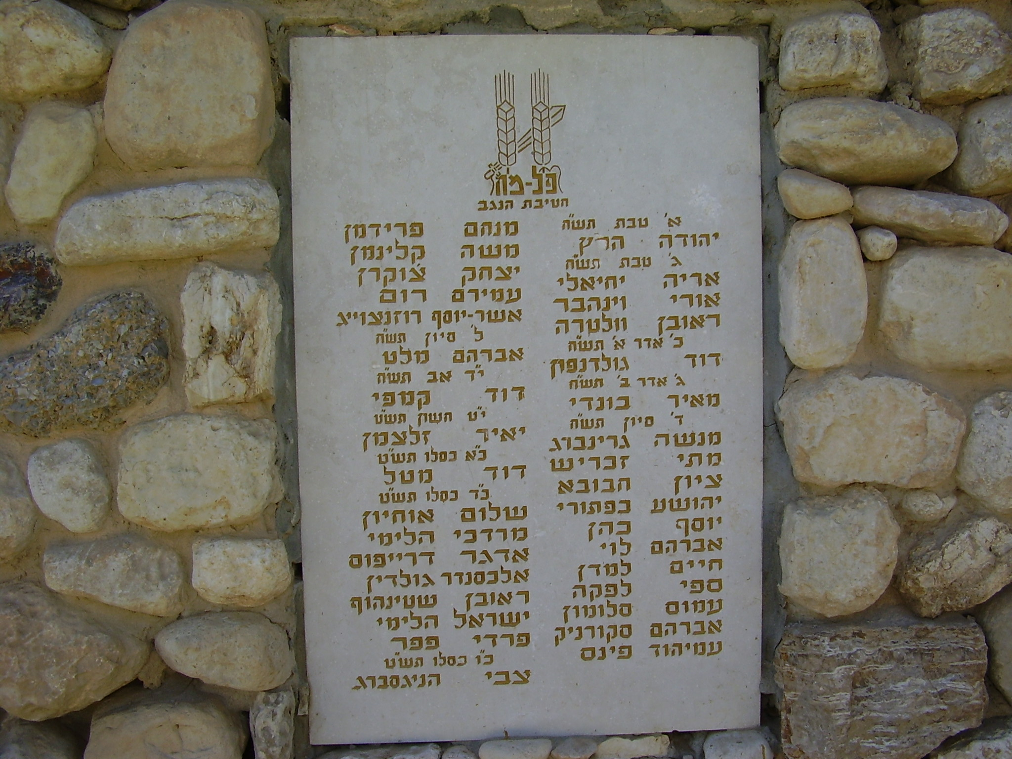 טבלת הנופלים באנדרטת באר משאבים בנגב